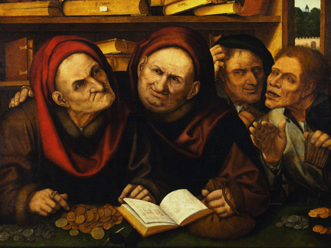 Tableau de Quentin Massys